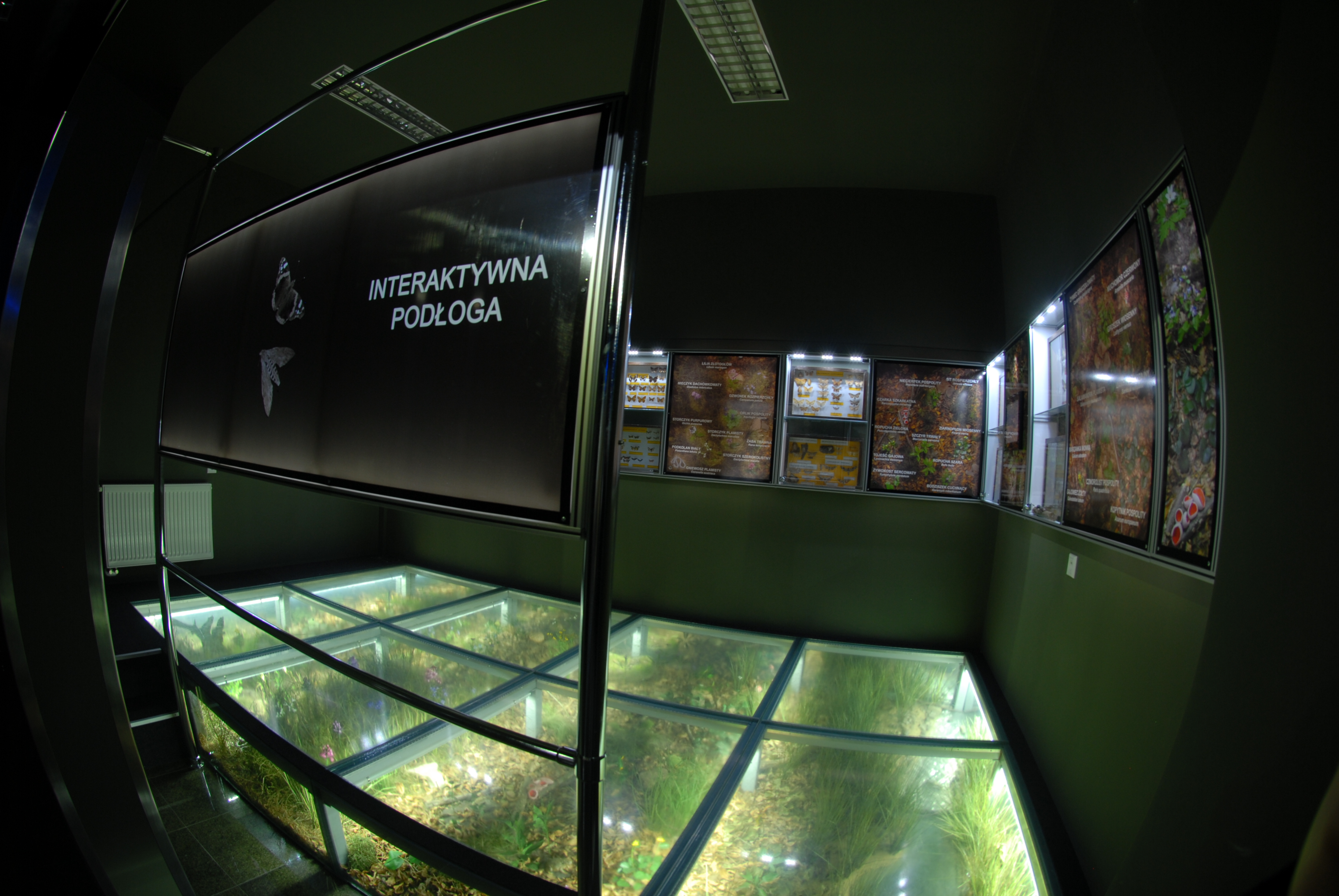 Interaktywna podłoga